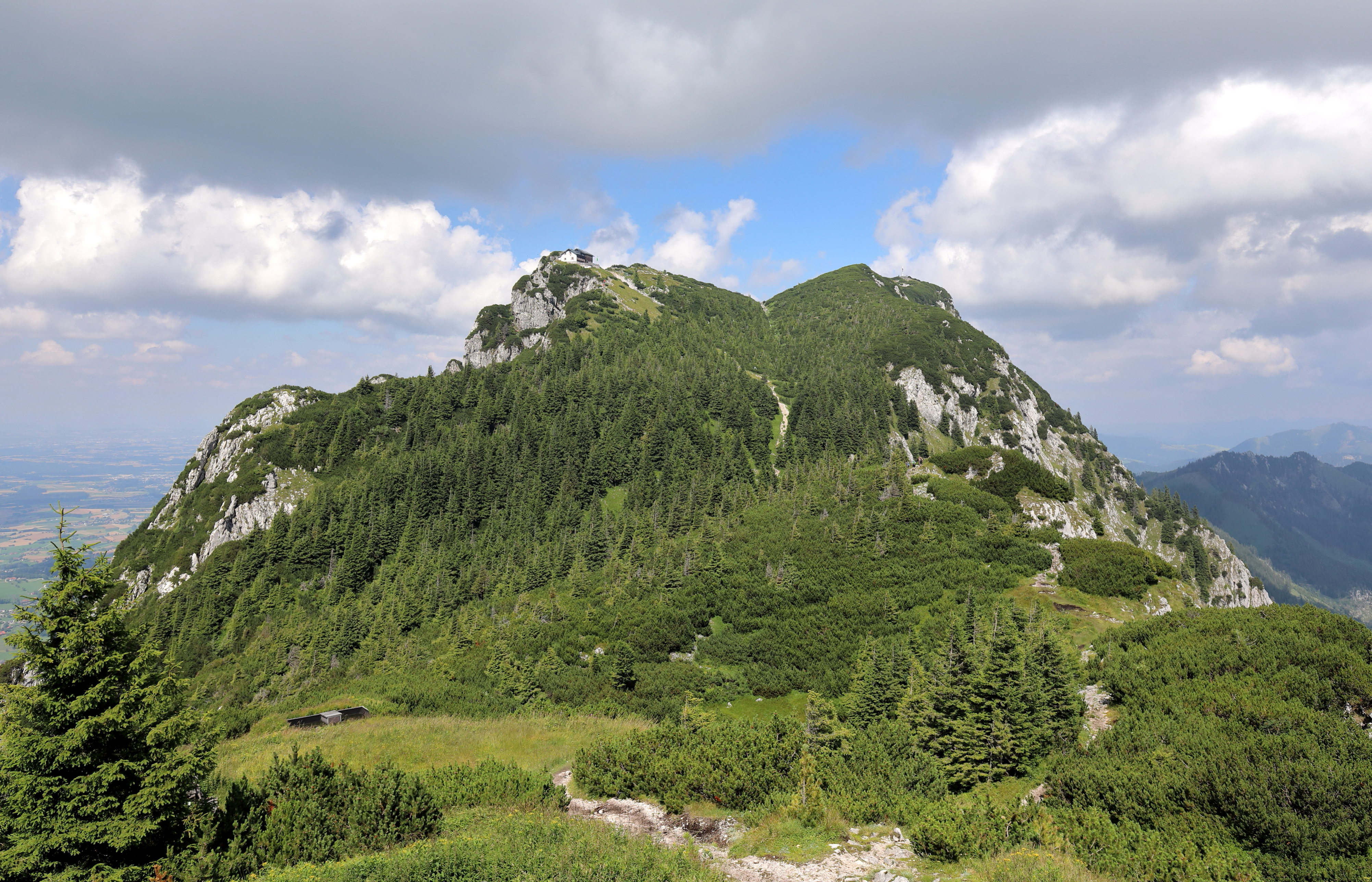 Das Gipfelplateau des Traunsteins in der oberösterreichischen Gemeinde Gmunden vom 1575 m hohen Traunkirchner Kogel bzw. dem Traunsteinhaus (Naturfreundehütte) aus gesehen. Links der 1666 m hohe Fahnenkogel mit der Gmundnerhütte und rechts der 1691 m hohe Pyramidenkogel mit dem Gipfelkreuz.